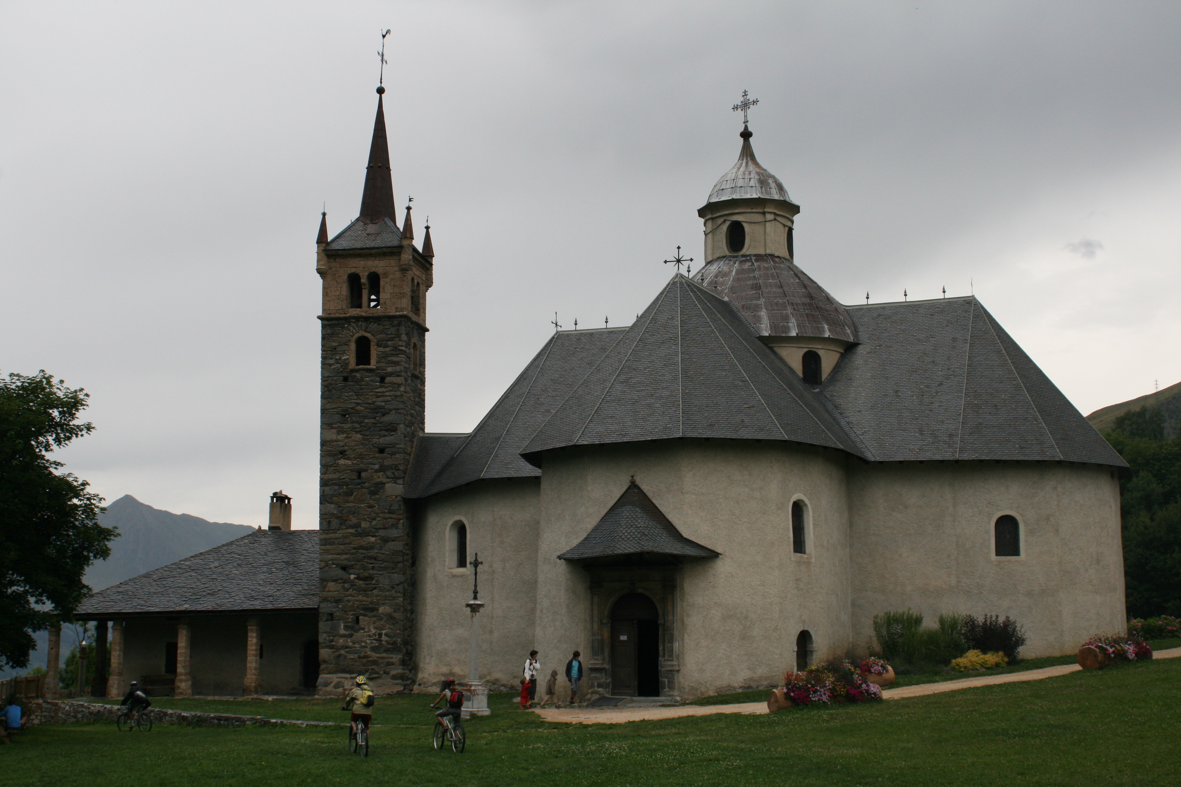 Sanctuaire de Notre-dame de la vie à Saint-Martin-de-Belleville